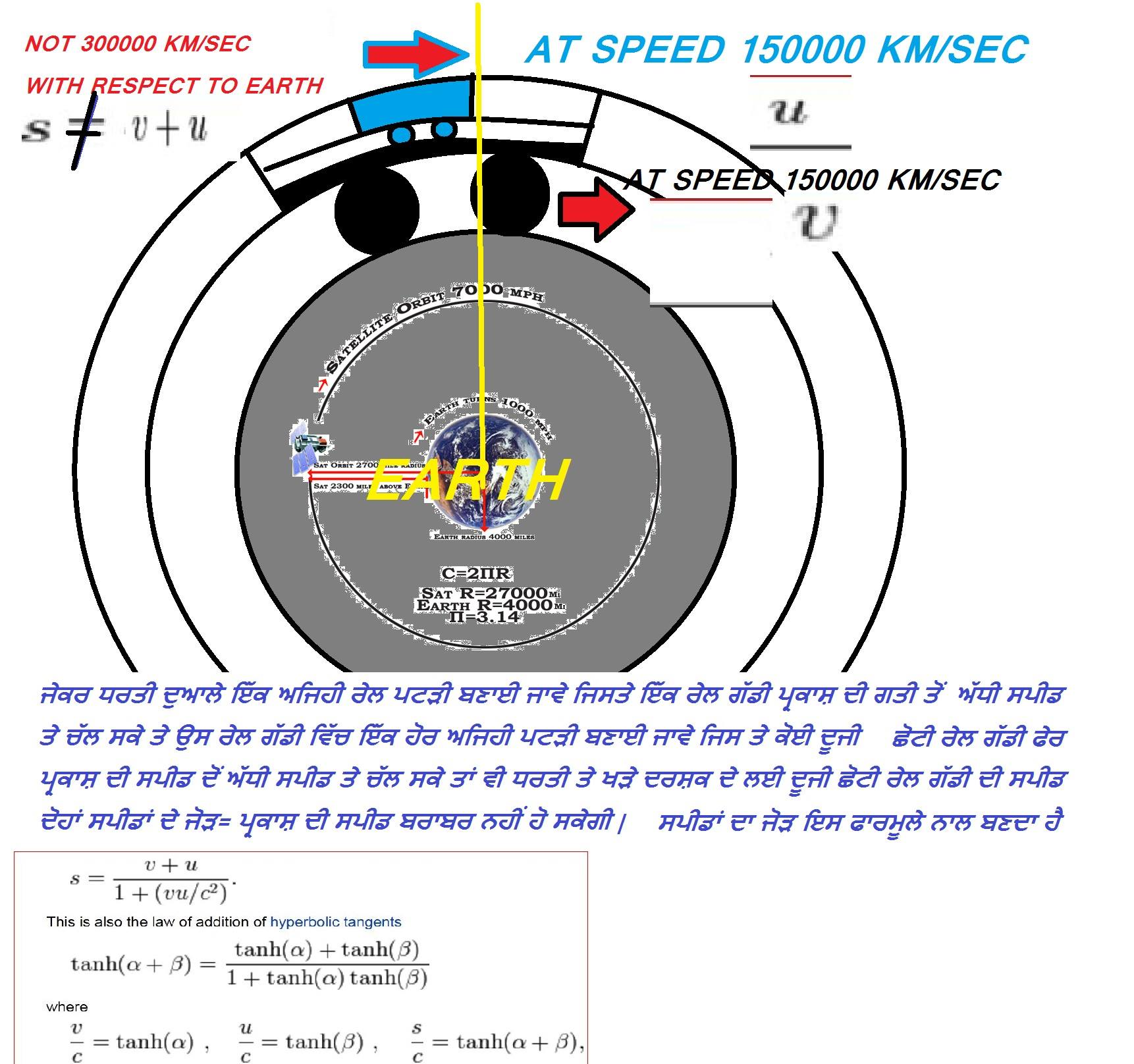 ਪੰਜਾਬੀ: ਜੇਕਰ ਧਰਤੀ ਦੁਆਲੇ ਇੱਕ ਅਜਿਹੀ ਰੇਲ ਪਟੜੀ ਬਣਾਈ ਜਾਵੇ ਜਿਸਤੇ ਇੱਕ ਲੰਬੀ ਰੇਲ ਗੱਡੀ ਪ੍ਰਕਾਸ਼ ਦੀ ਅੱਧੀ ਸਪੀਡ { ਧਰਤੀ ਦੇ ਭੂ-ਮੱਧ ਰੇਖਾ ਵਾਲੇ ਘੇਰੇ ਦੁਆਲੇ ਇੱਕ ਸੈਕੰਡ ਵਿੱਚ ਤਕਰੀਬਨ ਡੇਢ ਗੇੜਾ} ਤੇ ਦੌੜ ਸਕੇ ਅਤੇ ਉਸ ਰੇਲ ਗੱਡੀ ਵਿੱਚ ਇੱਕ ਹੋਰ ਰੇਲ ਪਟੜੀ ਬਣਾਈ ਜਾਵੇ ਜਿਸ ਵਿੱਚ ਇੱਕ ਦੂਜੀ ਛੋਟੀ ਰੇਲ ਗੱਡੀ ਪ੍ਰਕਾਸ਼ ਦੀ ਅੱਧੀ ਸਪੀਡ ਨਾਲ ਦੌੜ ਸਕੇ , ਤਾਂ ਵੀ ਧਰਤੀ ਤੇ ਖੜੇ ਦਰਸ਼ਕ ਲਈ ਦੂਜੀ ਛੋਟੀ ਰੇਲ ਗੱਡੀ ਕਦੇ ਵੀ ਪ੍ਰਕਾਸ਼ ਦੀ ਸਪੀਡ ਨਹੀਂ ਹਾਸਲ ਕਰ ਸਕੇਗੀ